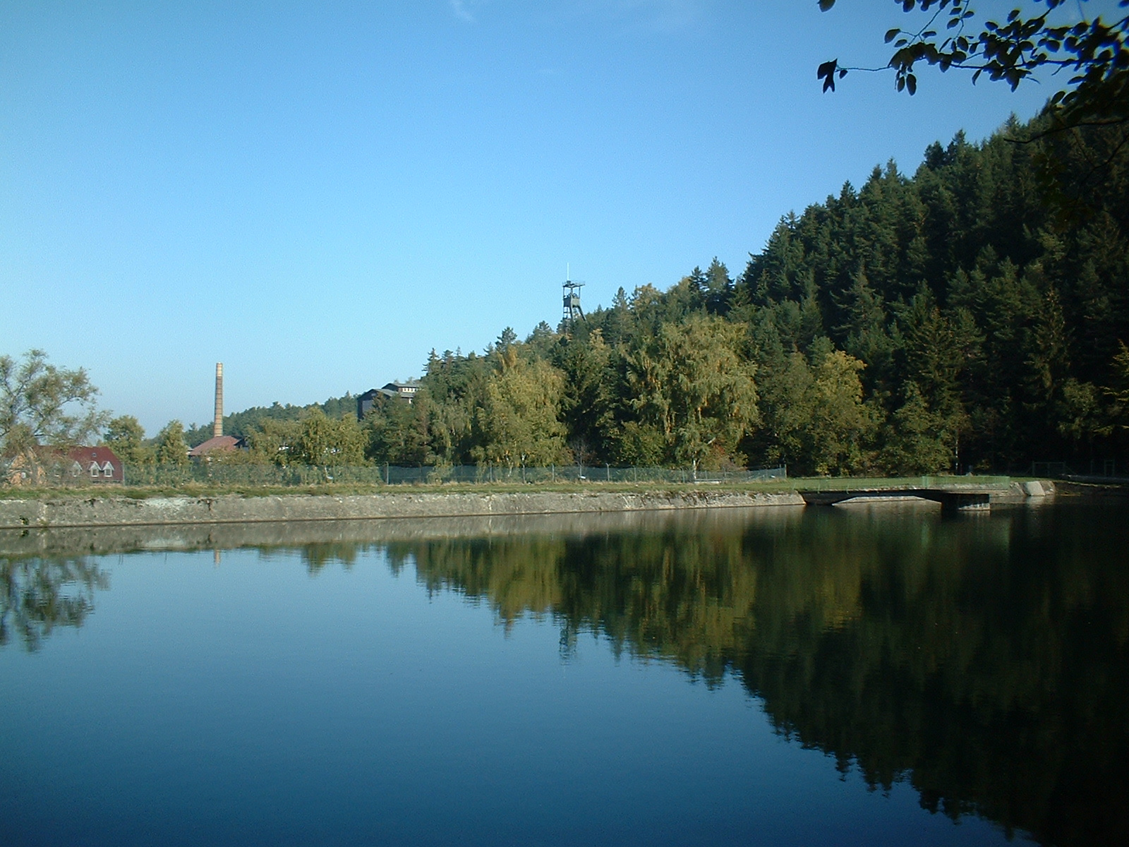 Dammkrone des Herzberger Teiches, im Hintergrund Tagesanlagen des Erzbergwerk Rammelsberg und das Fördergerüst vom Rammelsbergschacht